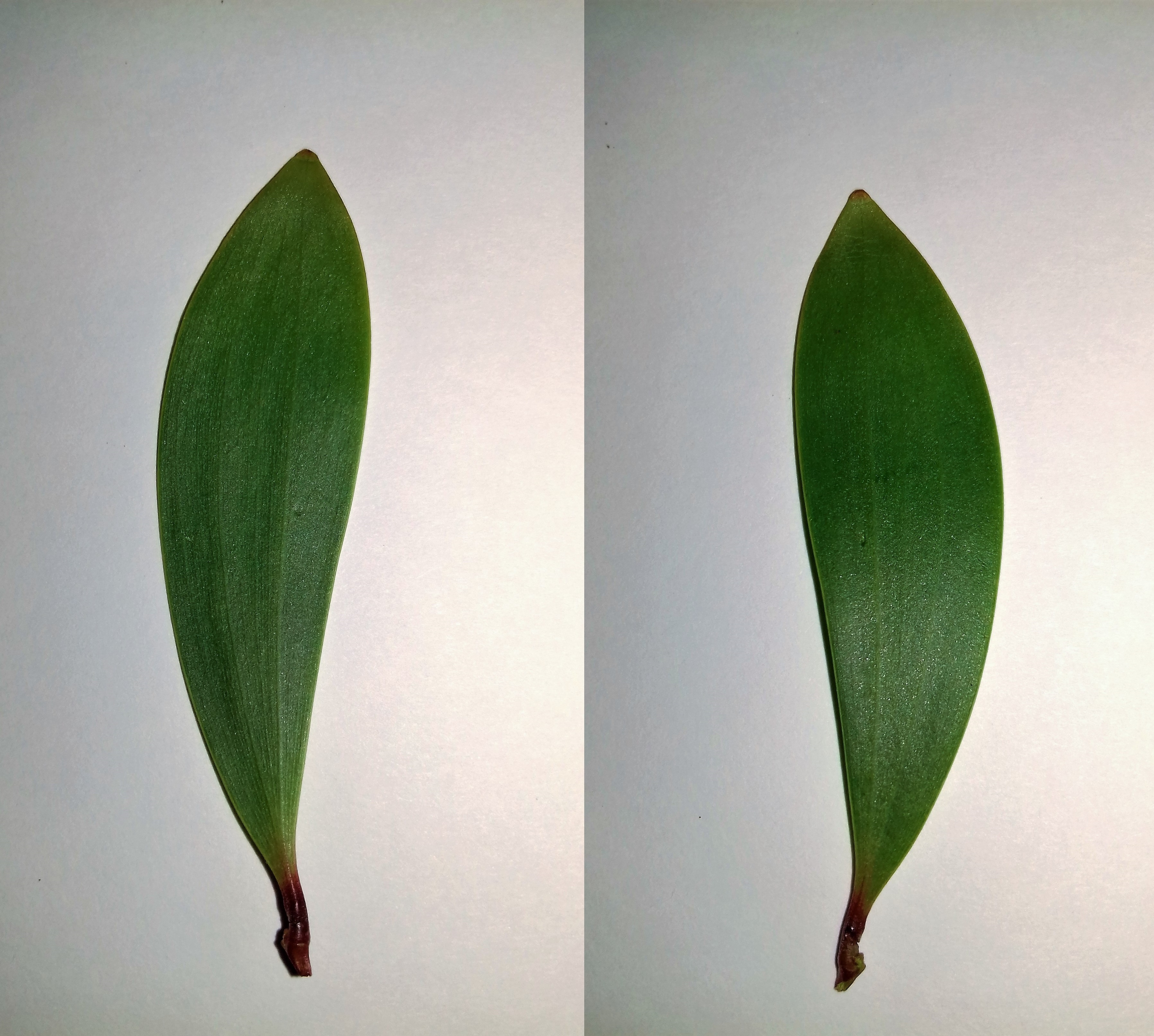 Phyllode d'Acacia spirorbis vu d'un côté et de l'autre, prélevé sur un individu situé à Nouméa, en Nouvelle-Calédonie.